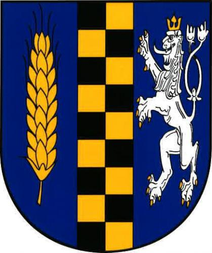 Všestudy (okres Chomutov), znak. V modrém štítě černo-zlatě šachovaný kůl provázený vpravo zlatým obilným klasem a vlevo korunovaným stříbrným dvouocasým lvem se zlatou zbrojí.